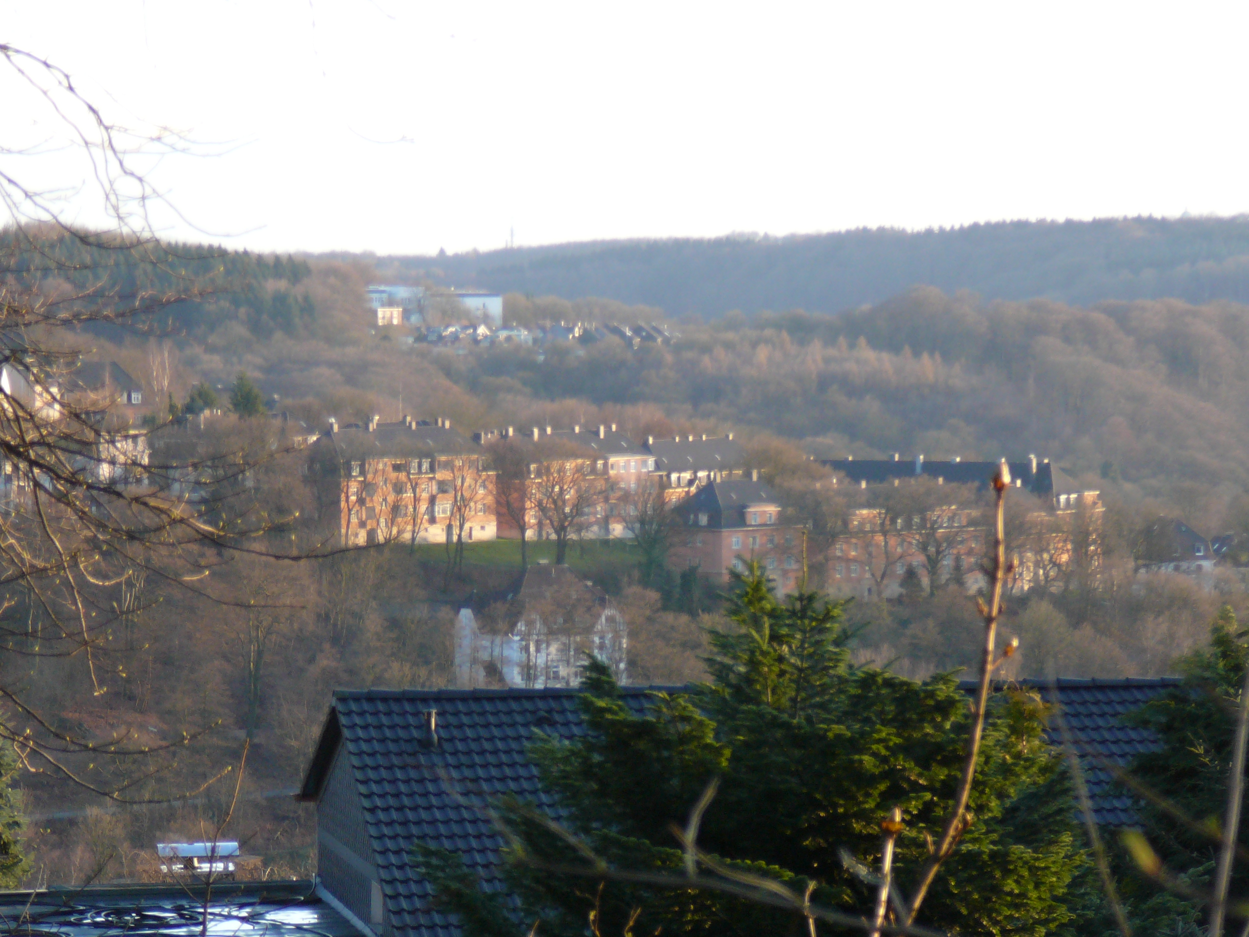 Nützenbergpark, Wuppertal